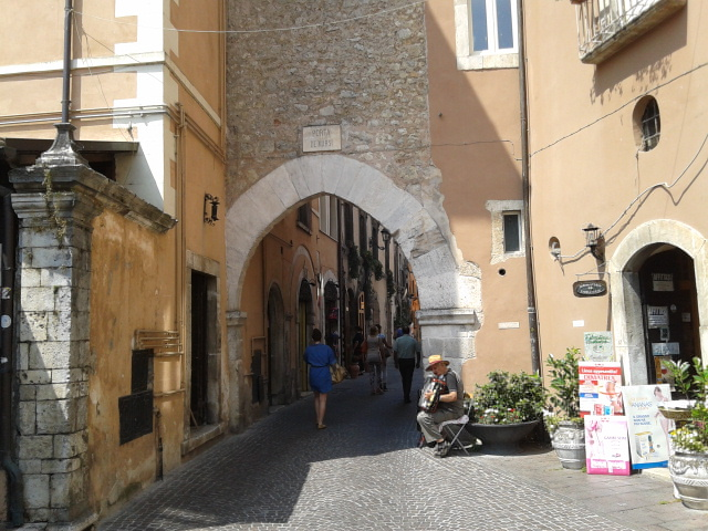 La caratteristica porta dei Marsi